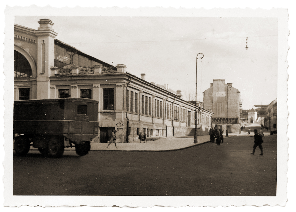 Halės turgavietė 1941 m.